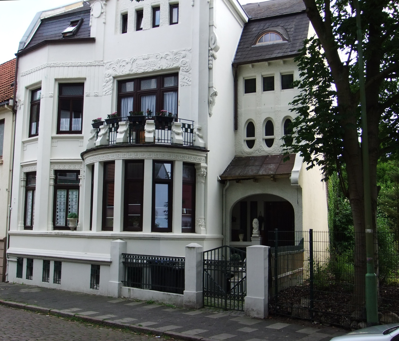 Haus Dr. Diekmann in Bremerhaven, Neue Straße 4. Das abgebildete Objekt ist ein geschütztes Kulturdenkmal in der Freien Hansestadt Bremen, mit der Nr. 1579 beim Landesamt für Denkmalpflege registriert.